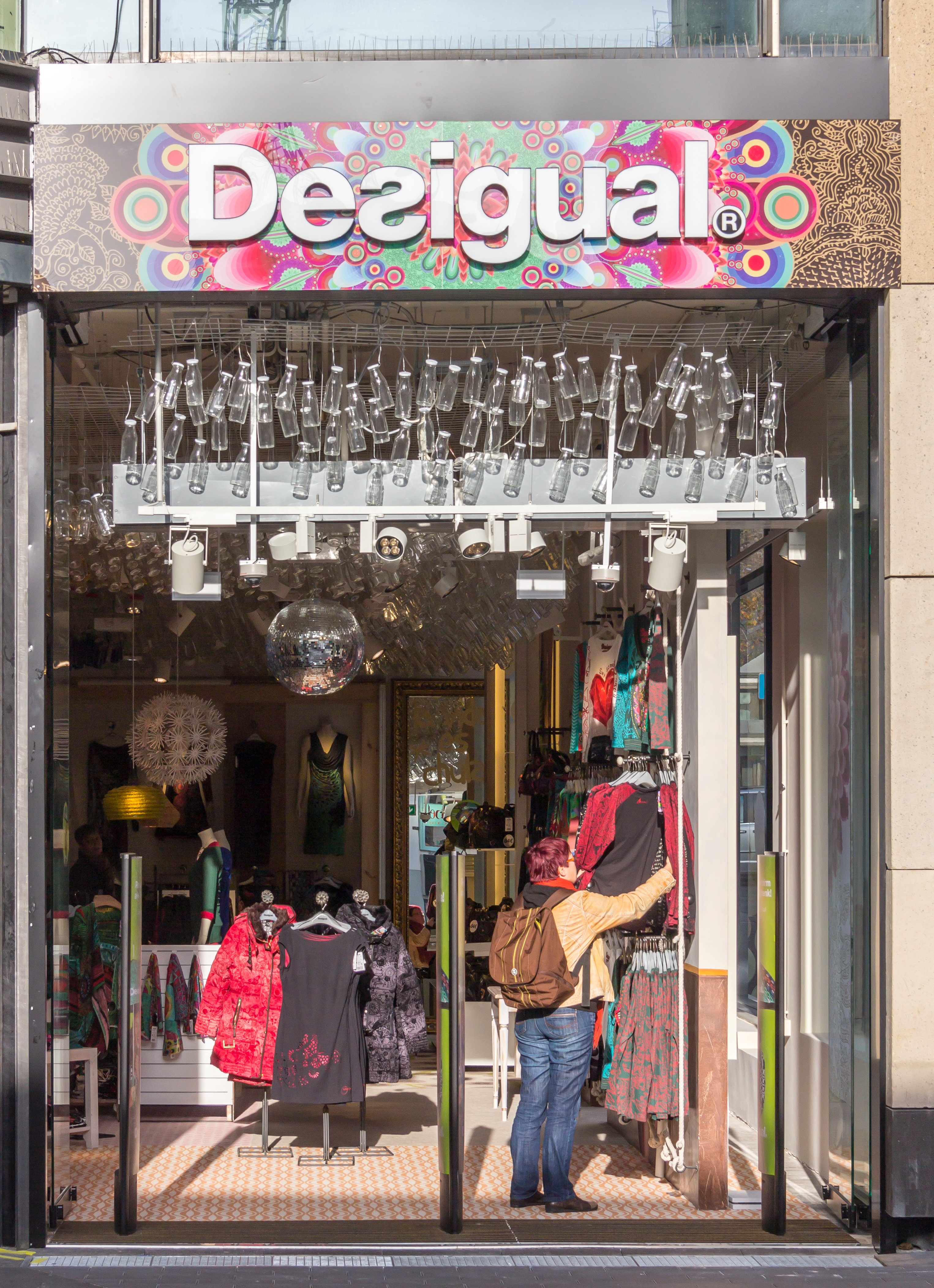 Desigual im DuMont-Carré, Breite Straße 80-90, Köln